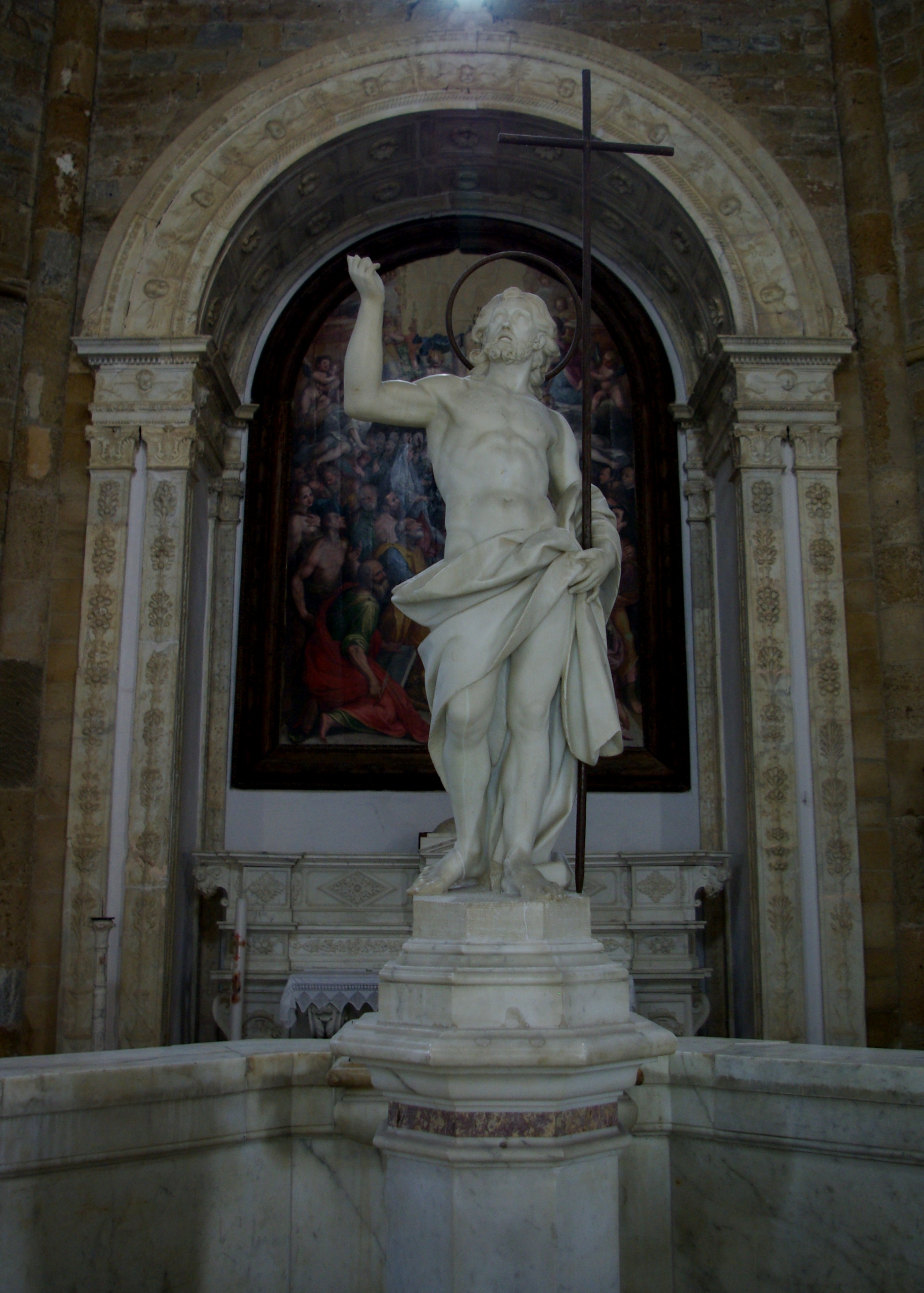 Statue Johannes des Täufers im Babtisterium San Giovanni in Volterra